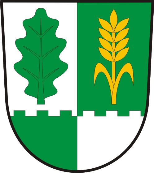 Doubravčice